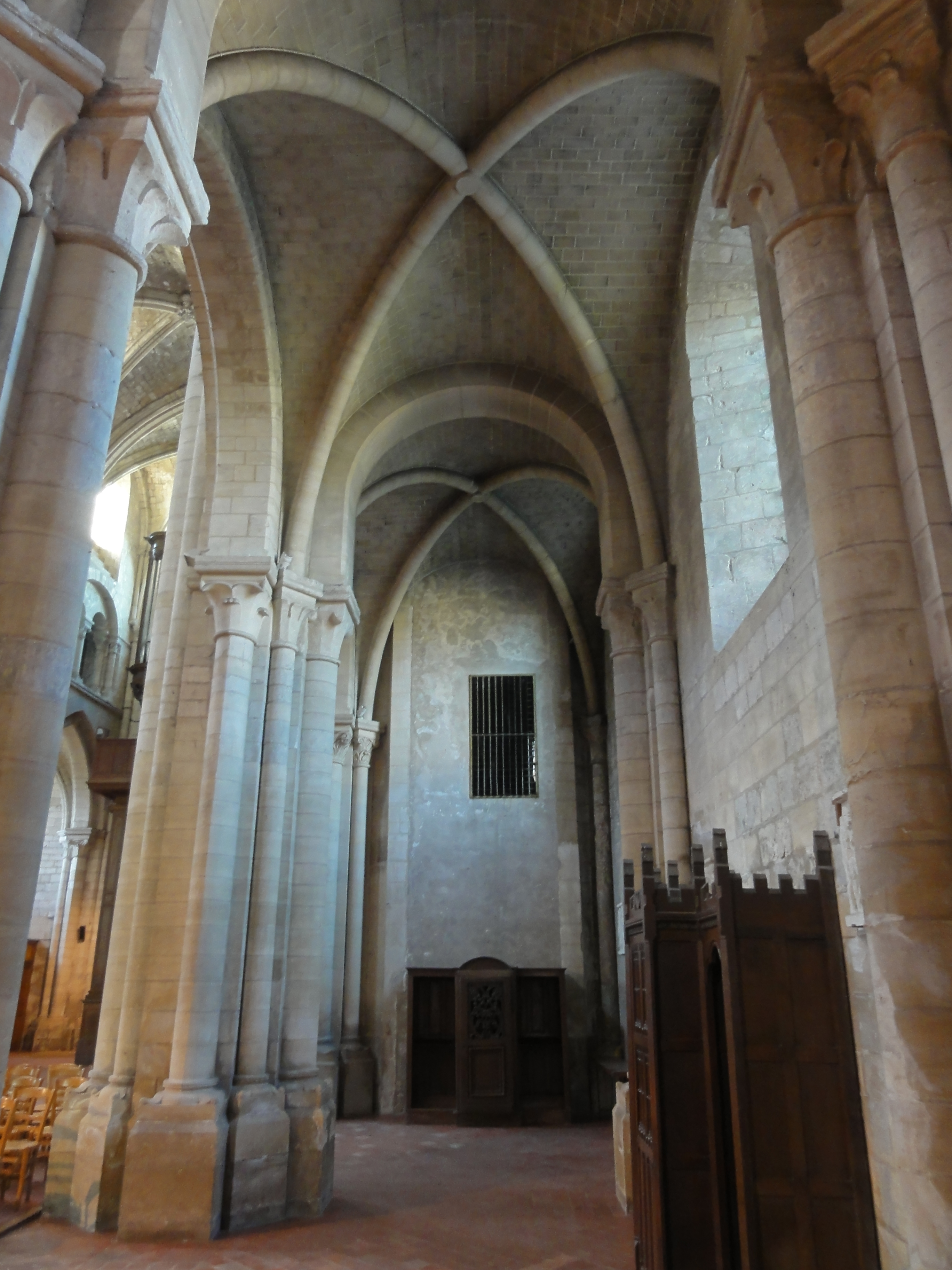 Bas-côté nord, vue vers l'ouest.